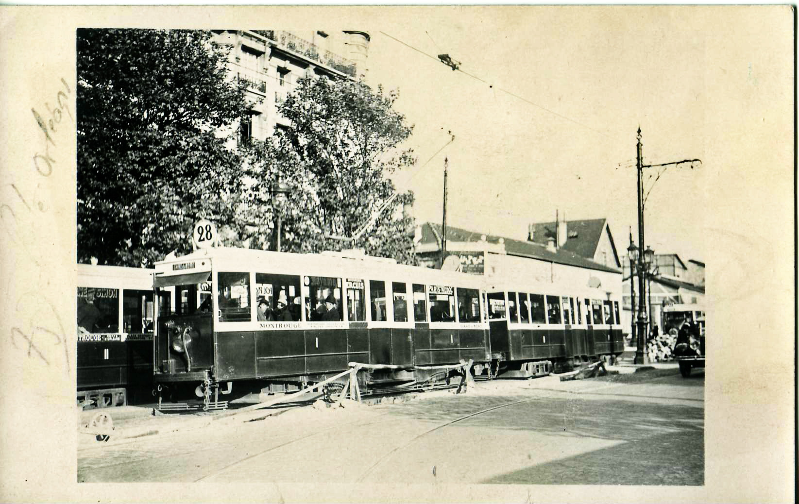 Carte-photo sans mention de photographe :Tramway 28 à Porte d'Orléans